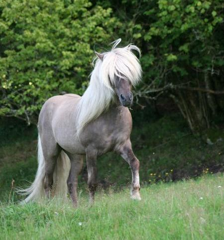 Blue Dun Silver Dapple